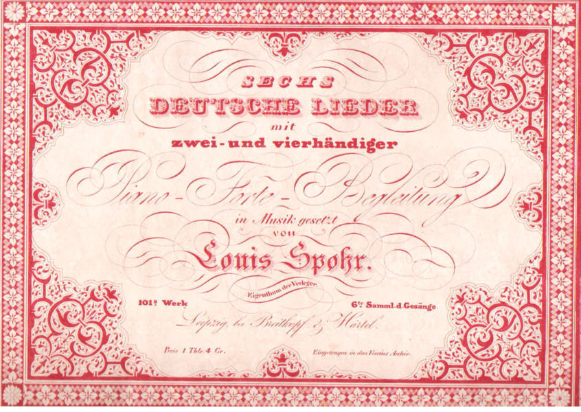 Titel der Erstausgabe der "Sechs Deutschen Lieder mit zwei-und vierhändiger Piano-Forte-Begleitung" Opus 101 von Louis Spohr aus dem Jahr 1837, Verlag: Breitkopf & Härtel, Leipzig, Platten Nr. 5822